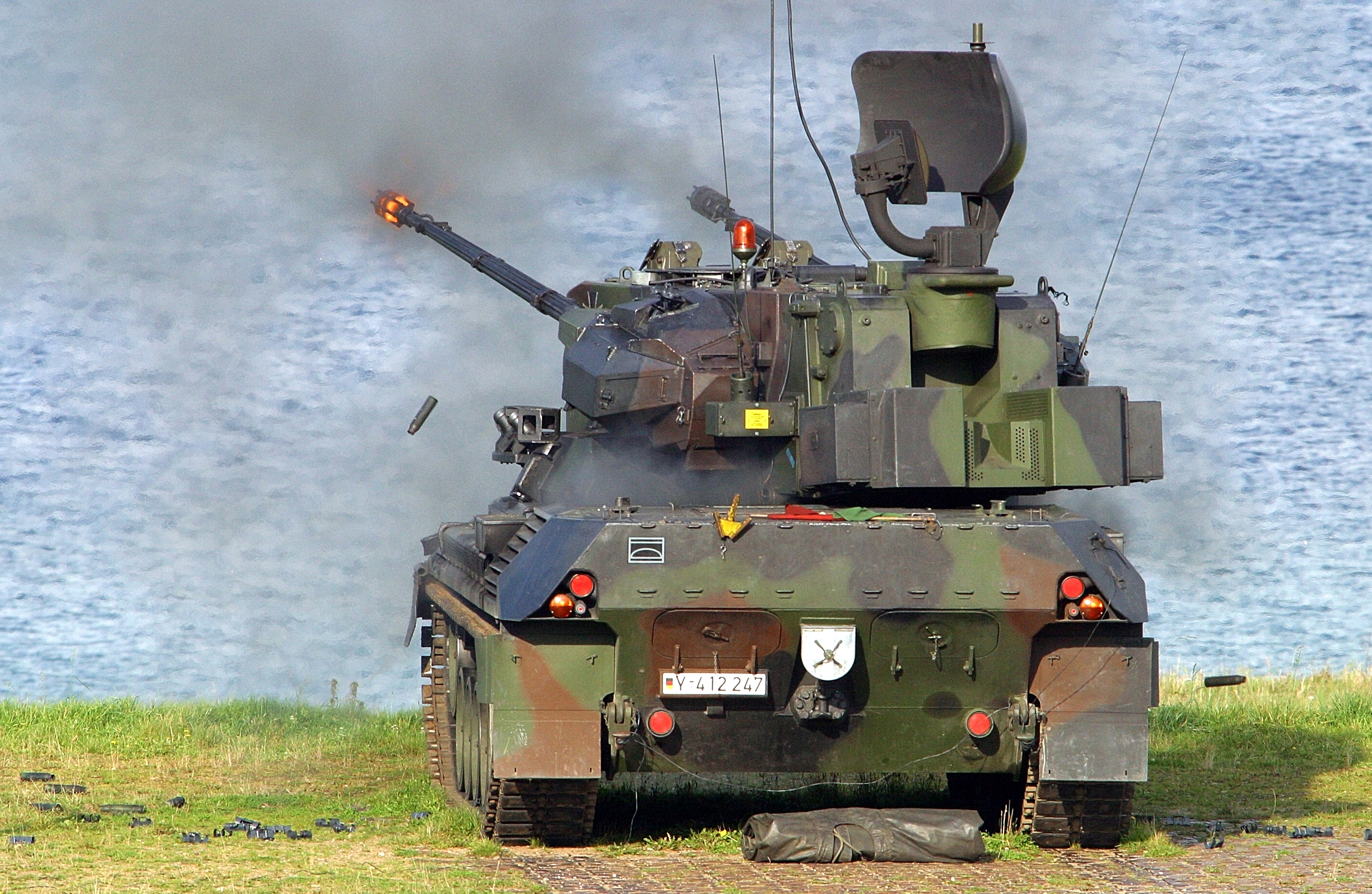 Schießen mit dem Flugabwehrkanonenpanzer Gepard auf Luftziele. ©Bundeswehr/Rott